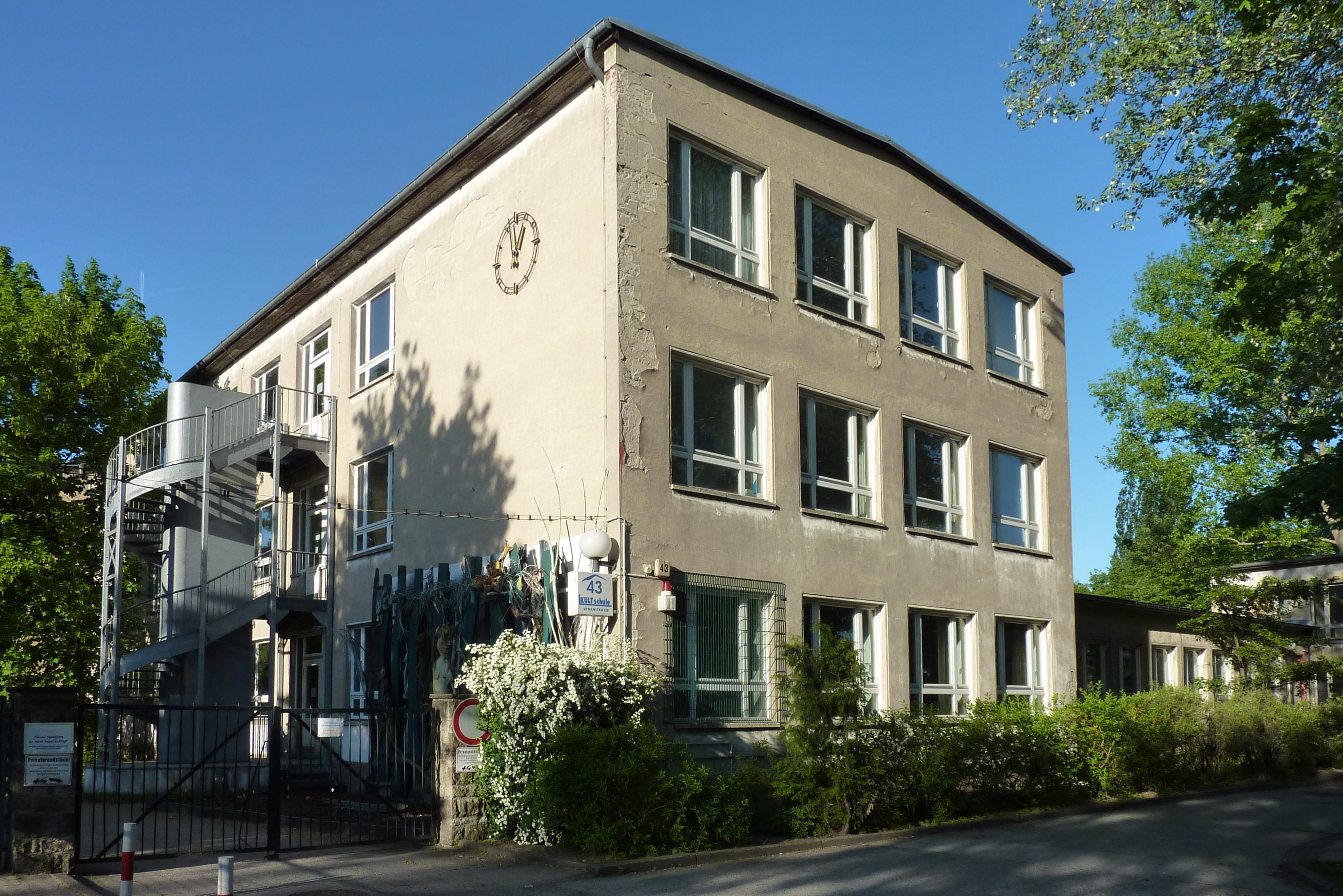 Sewanstraße 43 in Berlin-Friedrichsfelde. Soziokulturelles Zentrum KULTschule, vordem Gebäude der Niels-Bohr-Oberschule.